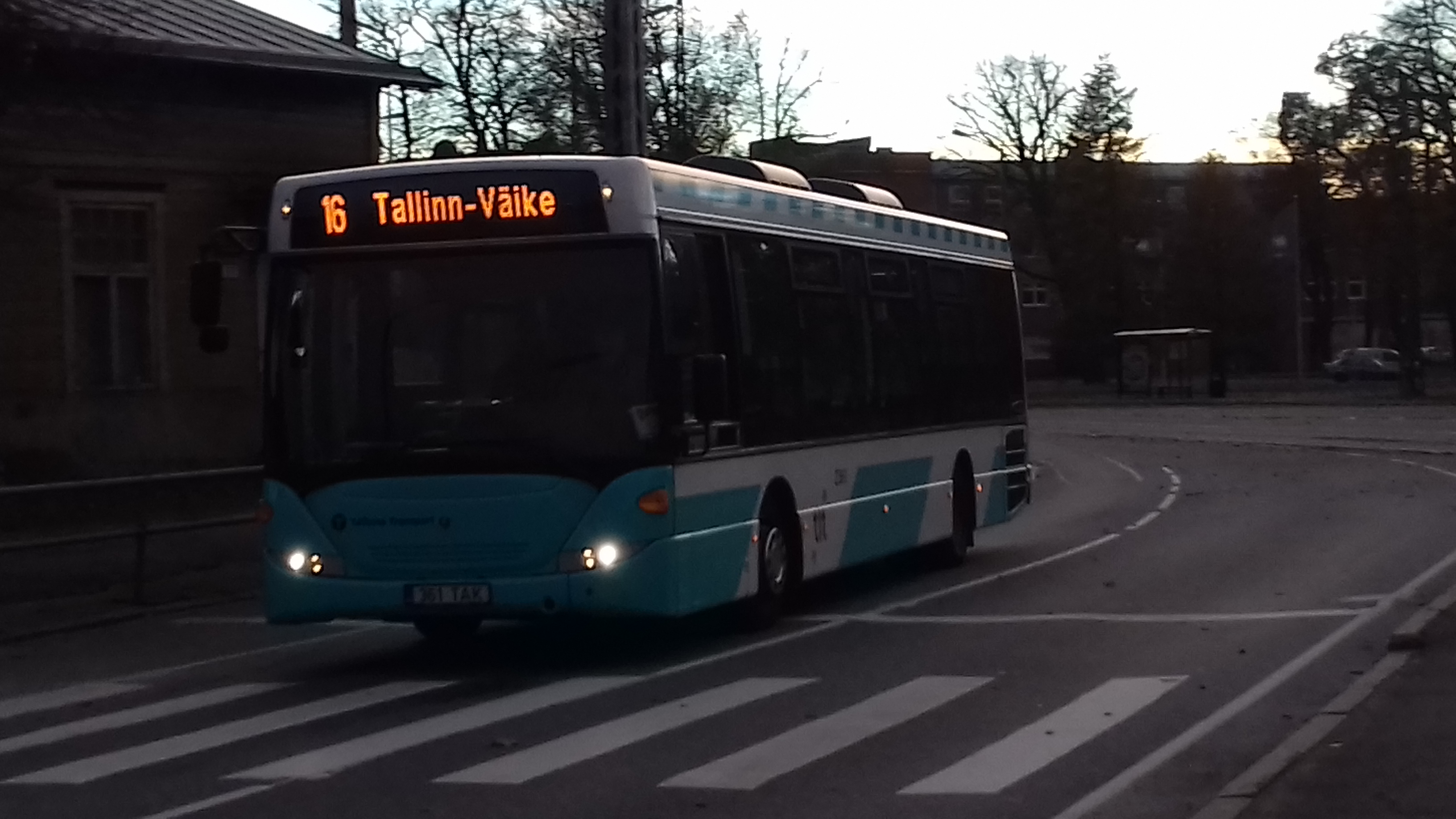 Scania OmniLink CK270UA 4X2LB Endla tänaval